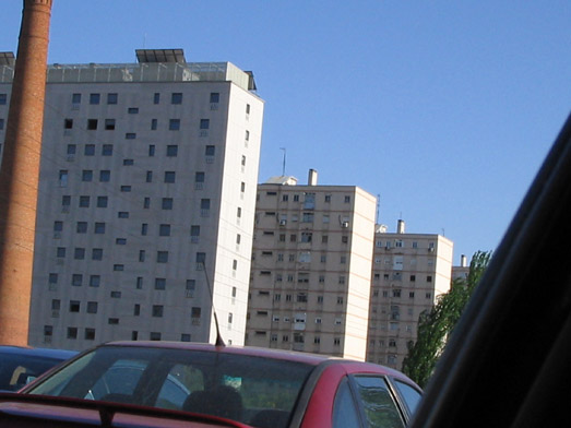 San Cristobal de los Ángeles (Villaverde)